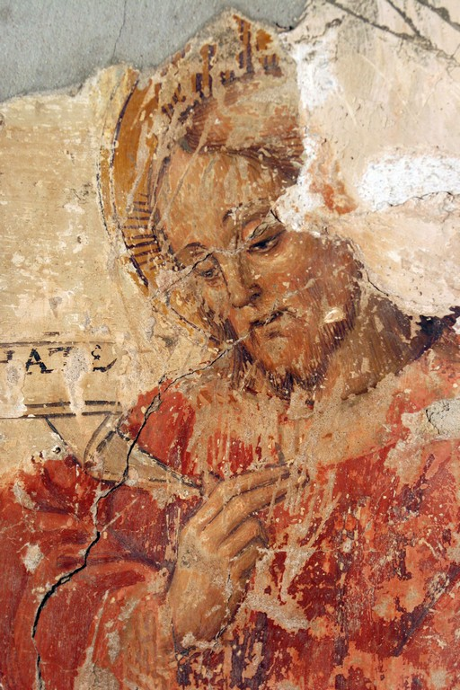 Affresco del 1500